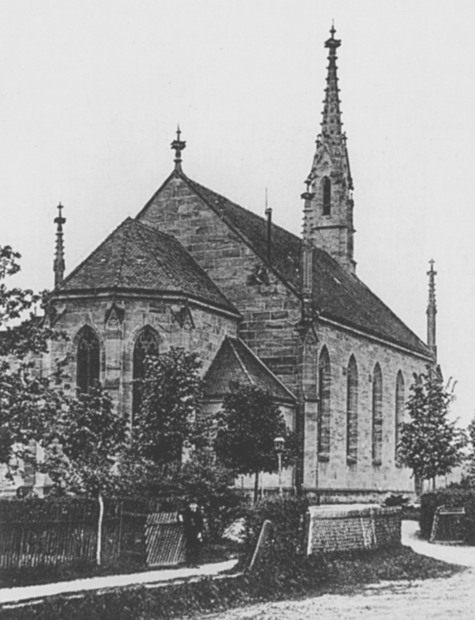 Die Laurentius-Kirche kurz nach ihrer Fertigstellung im Jahr 1887. Ansicht von Nordosten.